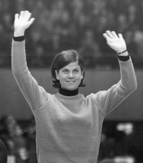 Ans Schut. Olympische Winterspelen te Grenoble. Het erepodium voor de medaillewinnaars bij het schaatsen voor dames over 3000 meter. Gouden medaillewinnares Ans Schut.